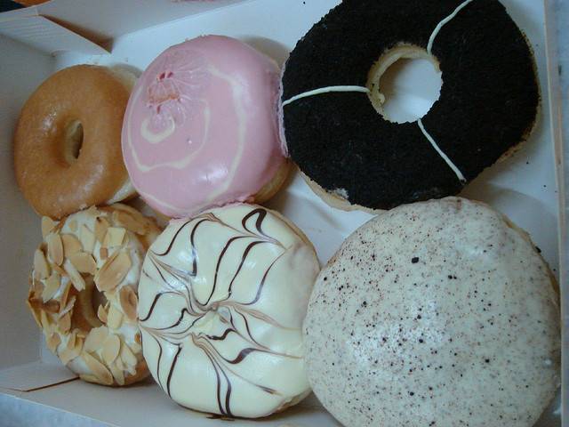 Donut O.D